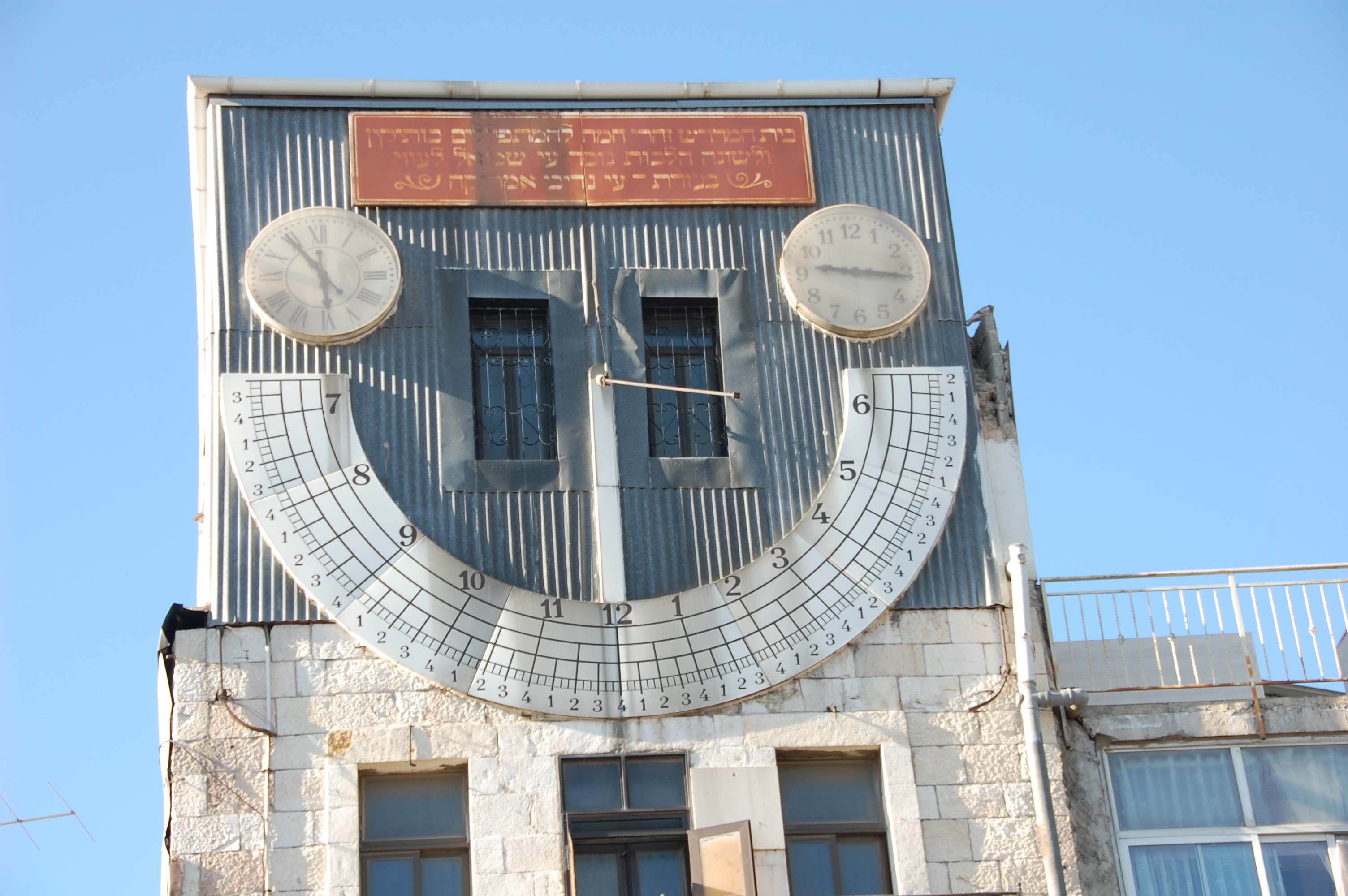 zaharey hama, jerusalem